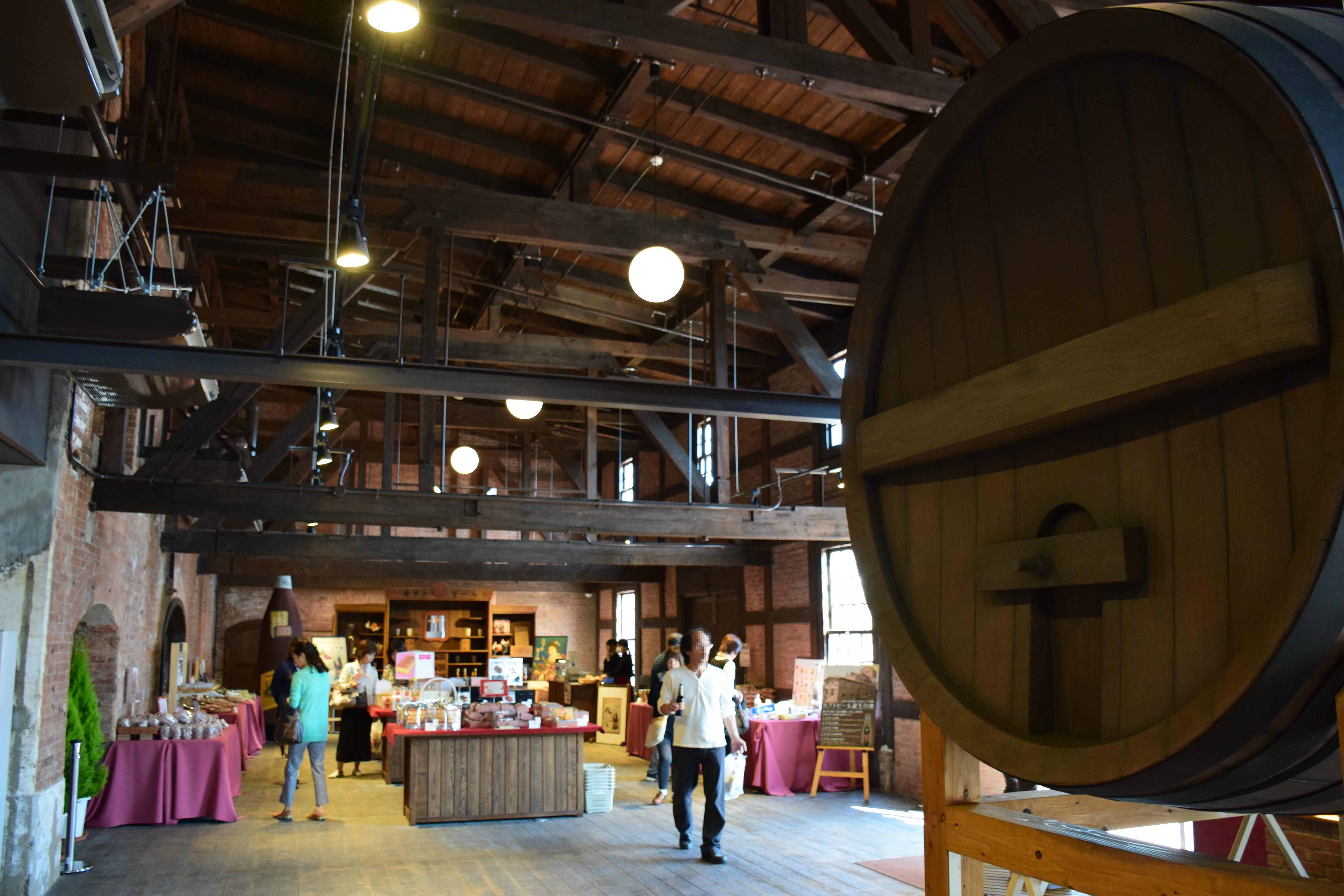 半田赤レンガ建物